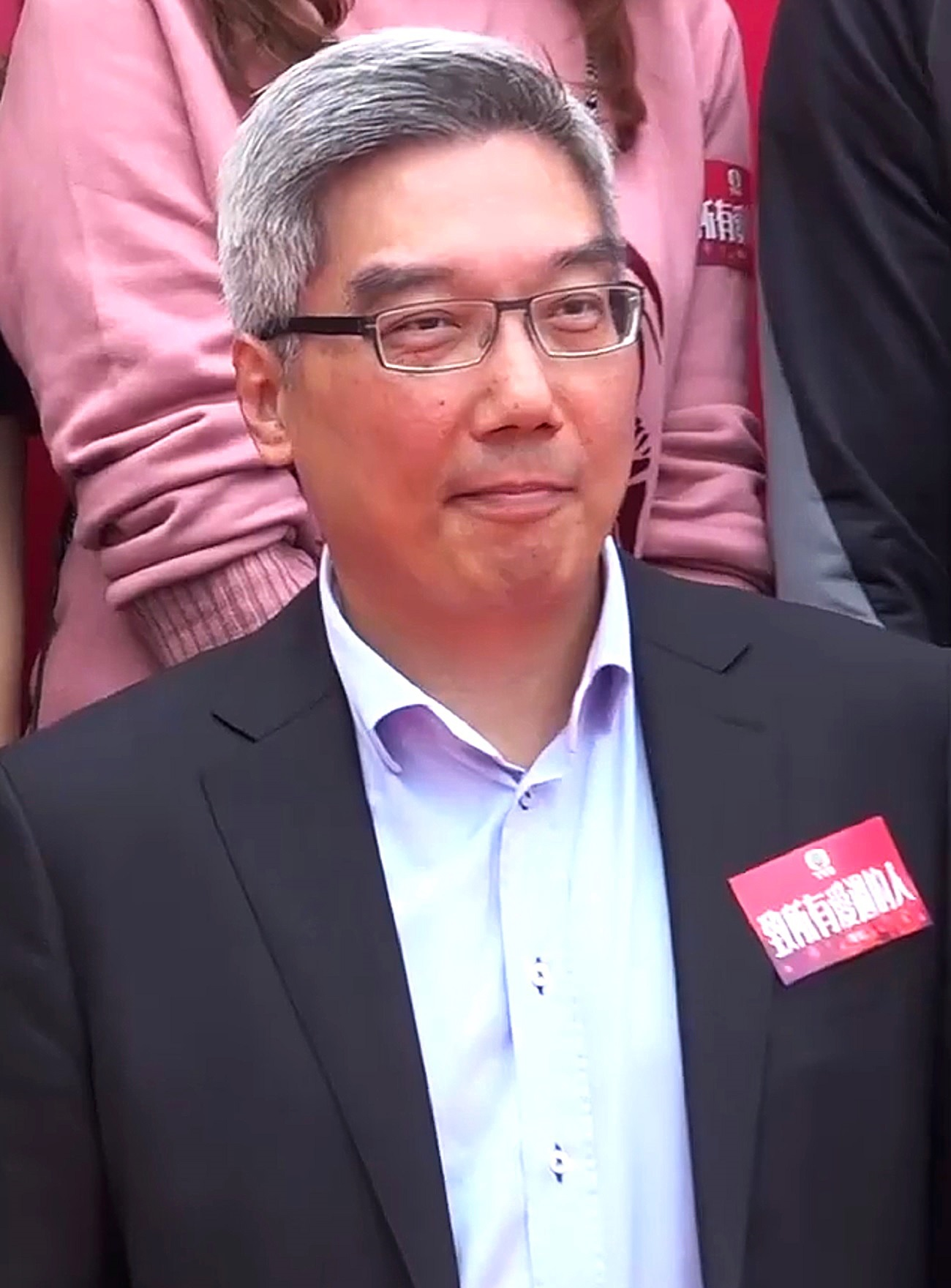 中文（香港）: 《那些我愛過的人》開鏡拜神記者會